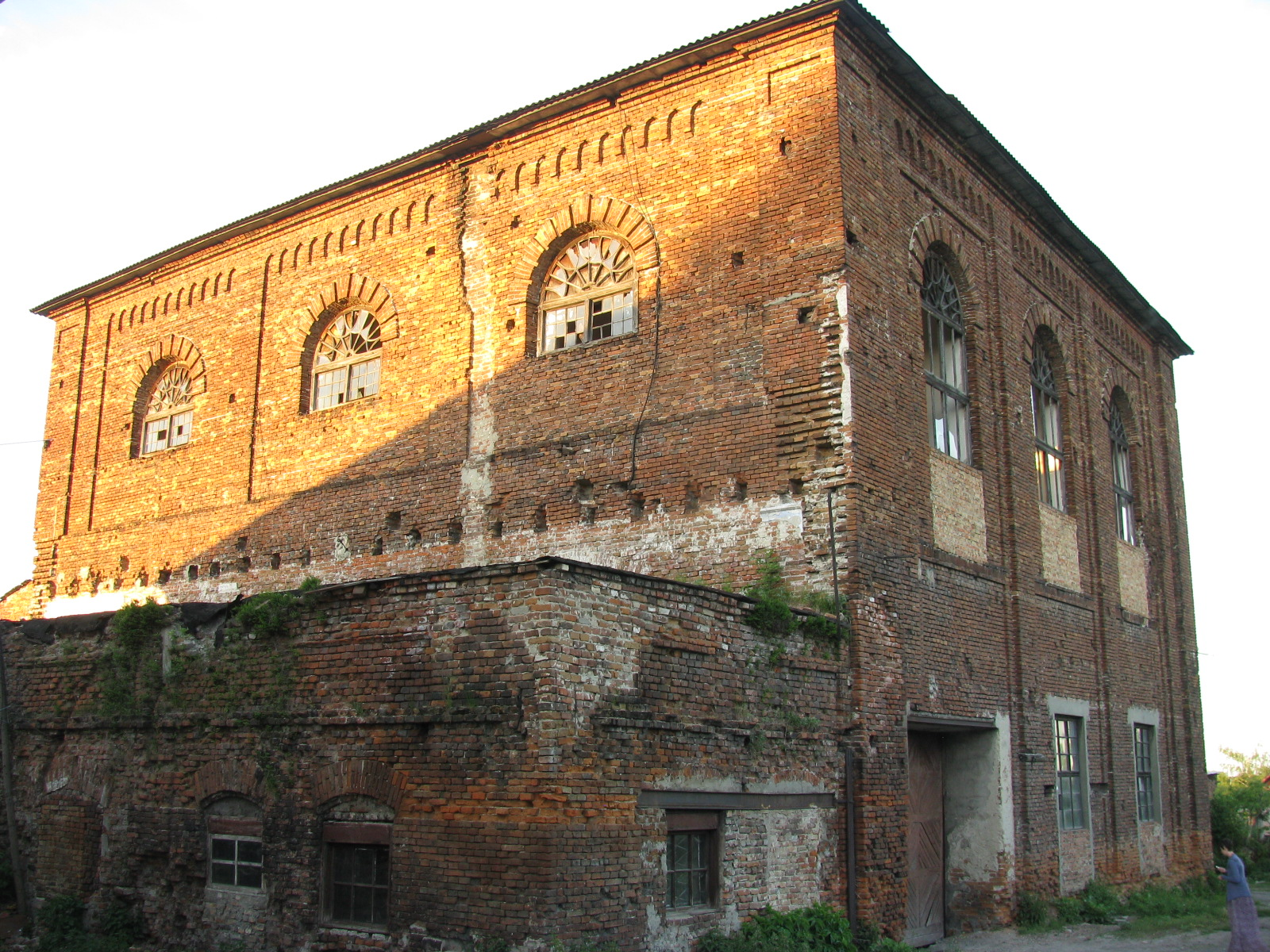 Синагога в Угневе.